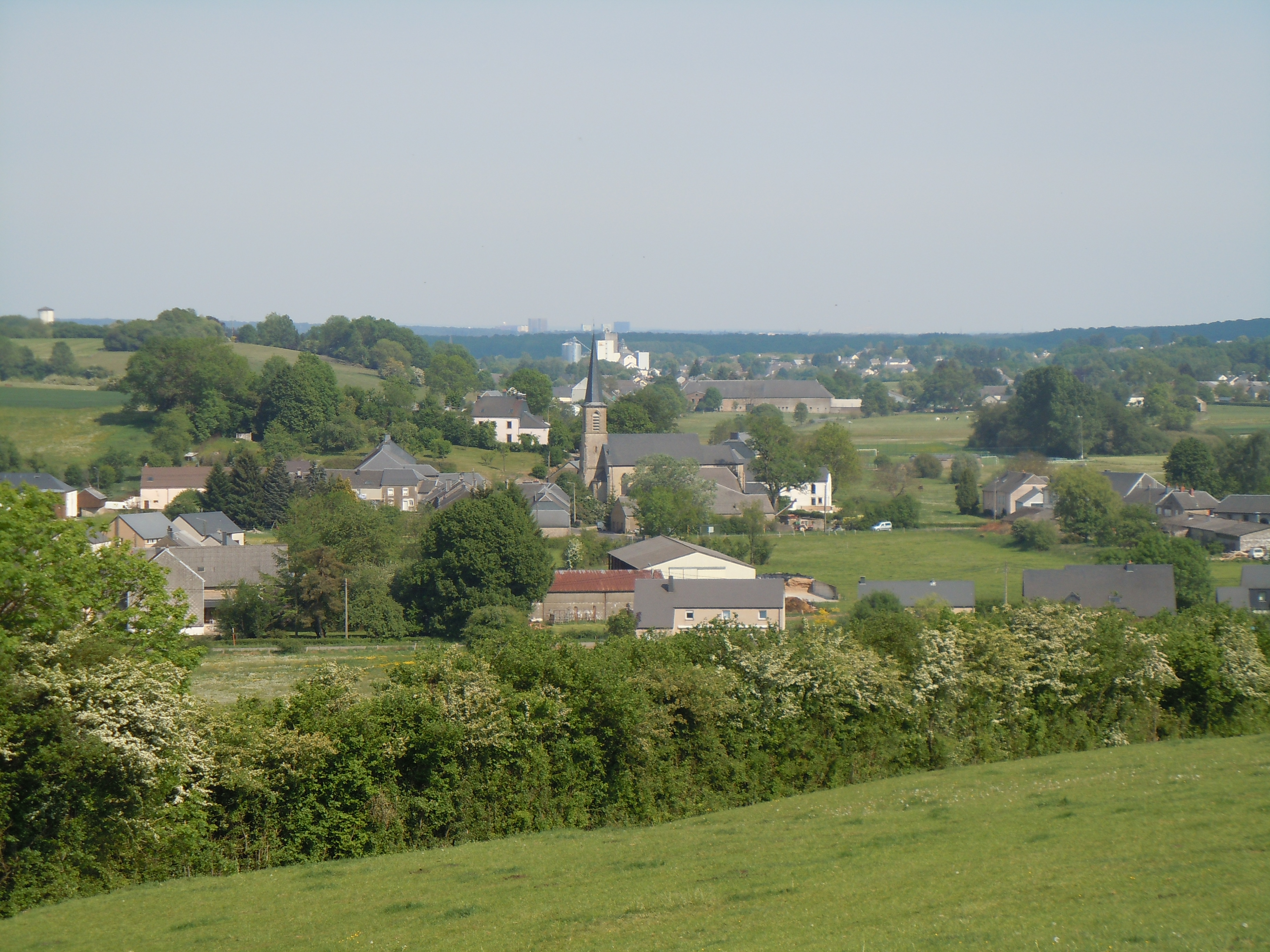 Le centre du village belge d'Autelbas-Barnich vu depuis la Hëtt à l'ouest